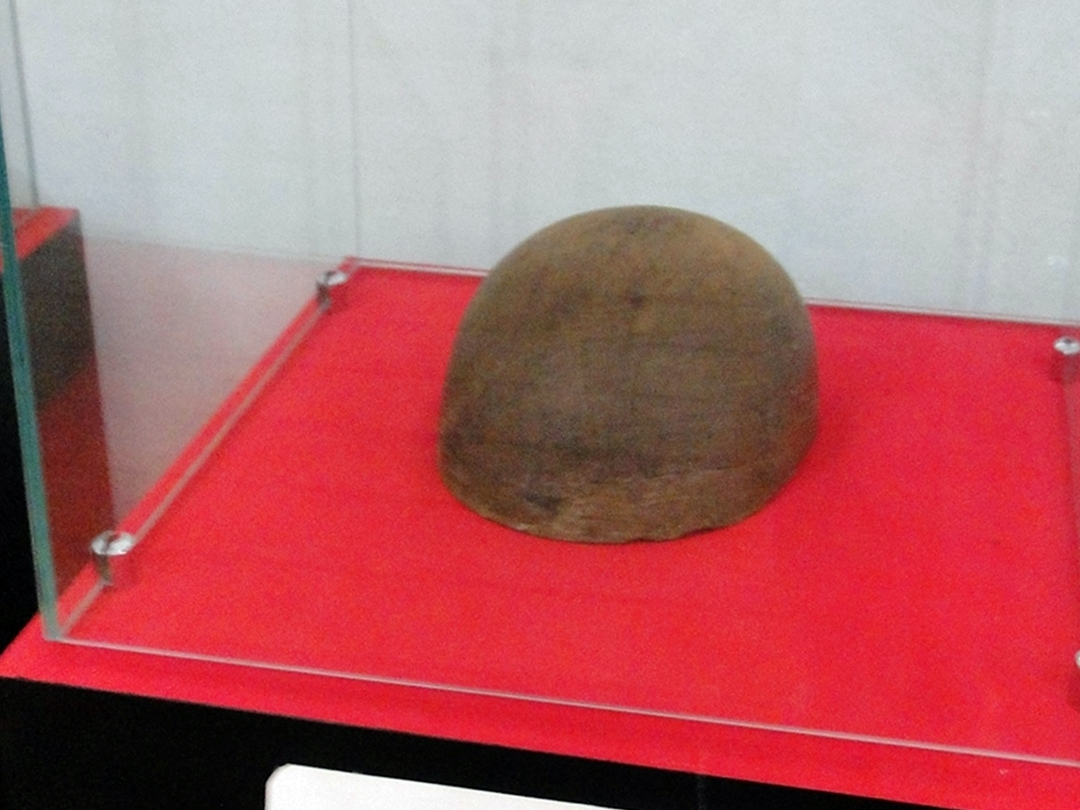 Forma de chapéu que pertenceu à pioneira fábrica de chapéus do Barão do Rio Verde